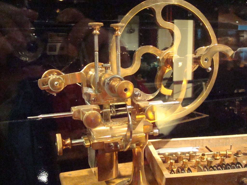 Villers-le-lac, Doubs, musée de l'horloge, mécanisme d'usinage ancien